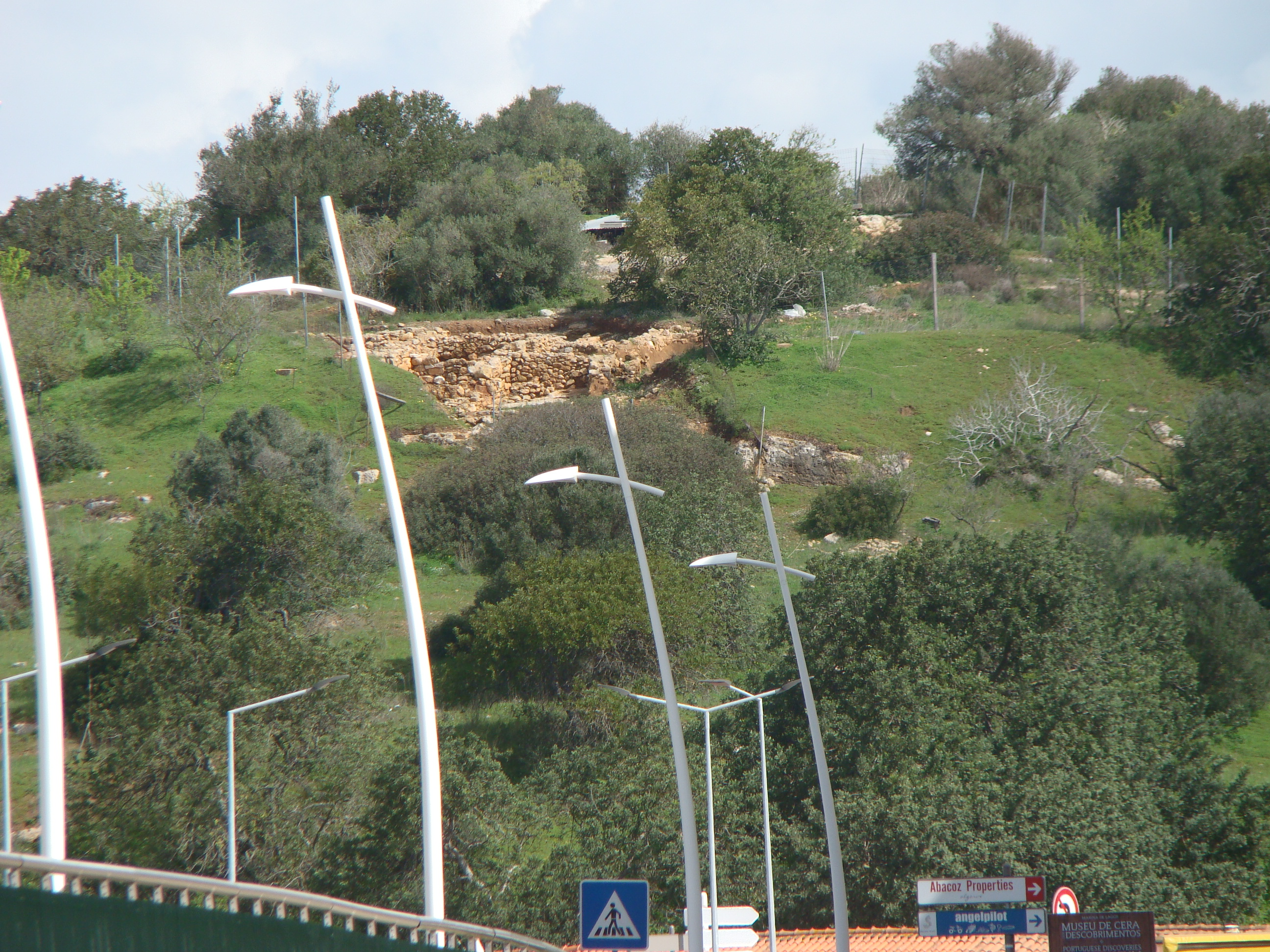 Vista do Monte Molião em Lagos, Algarve, em Março de 2018.